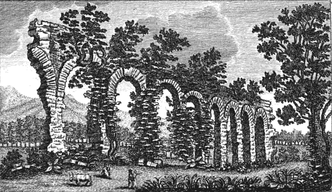 Vecchia illustrazione dei resti dell'acquedotto di Caldaccoli all'inizio del XIX secolo. Tratta dal libro "Viaggio pittorico della Toscana, Volume 3" di Francesco Fontani (1827).